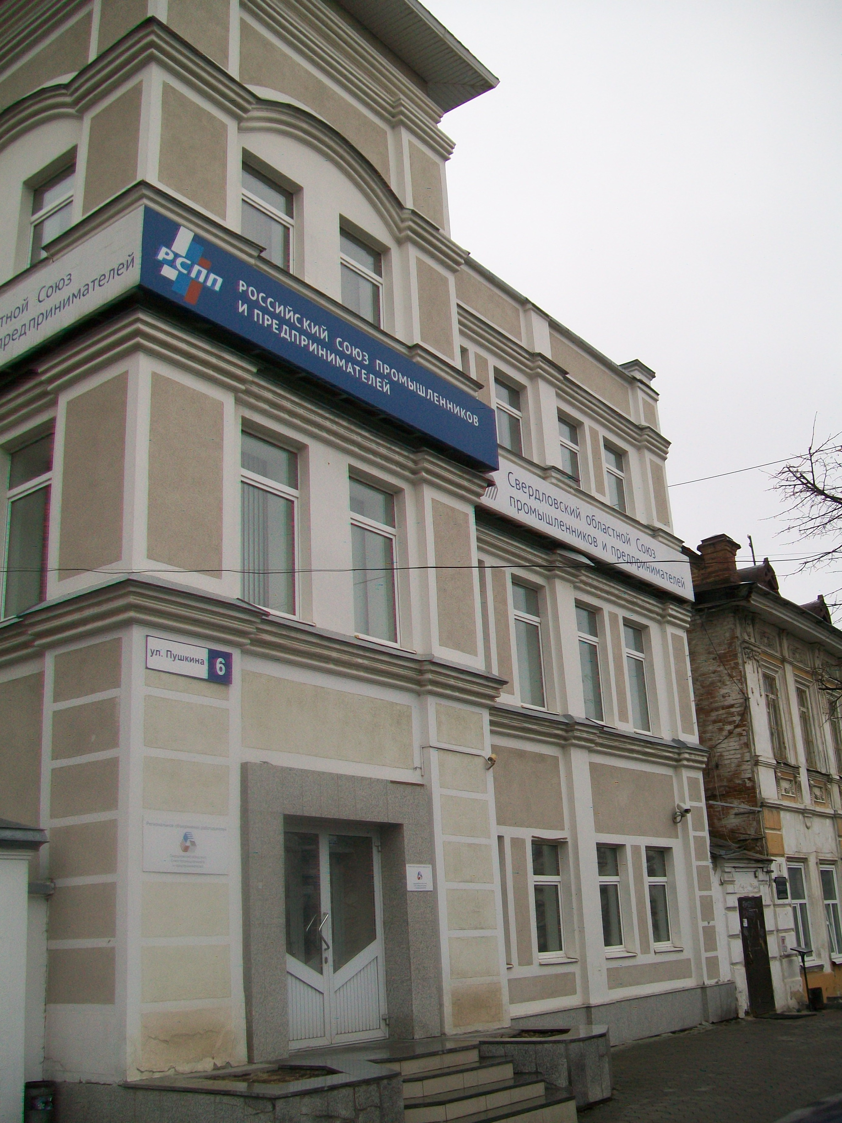 Здание отделения РОСП (Свердловского областного союза промышленников и предпринимателей) в Екатеринбурге, апрель 2017 года